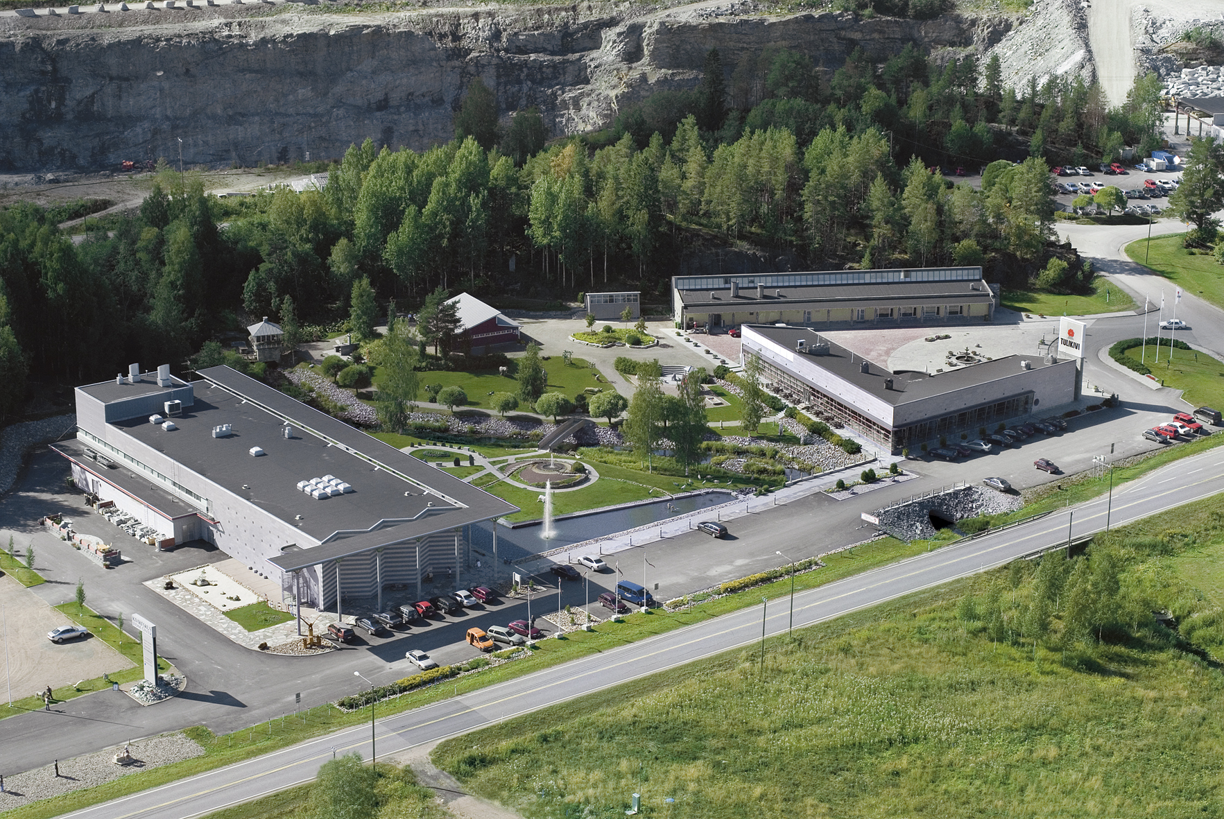 Tulikivi Kivikylä Juuka Finland